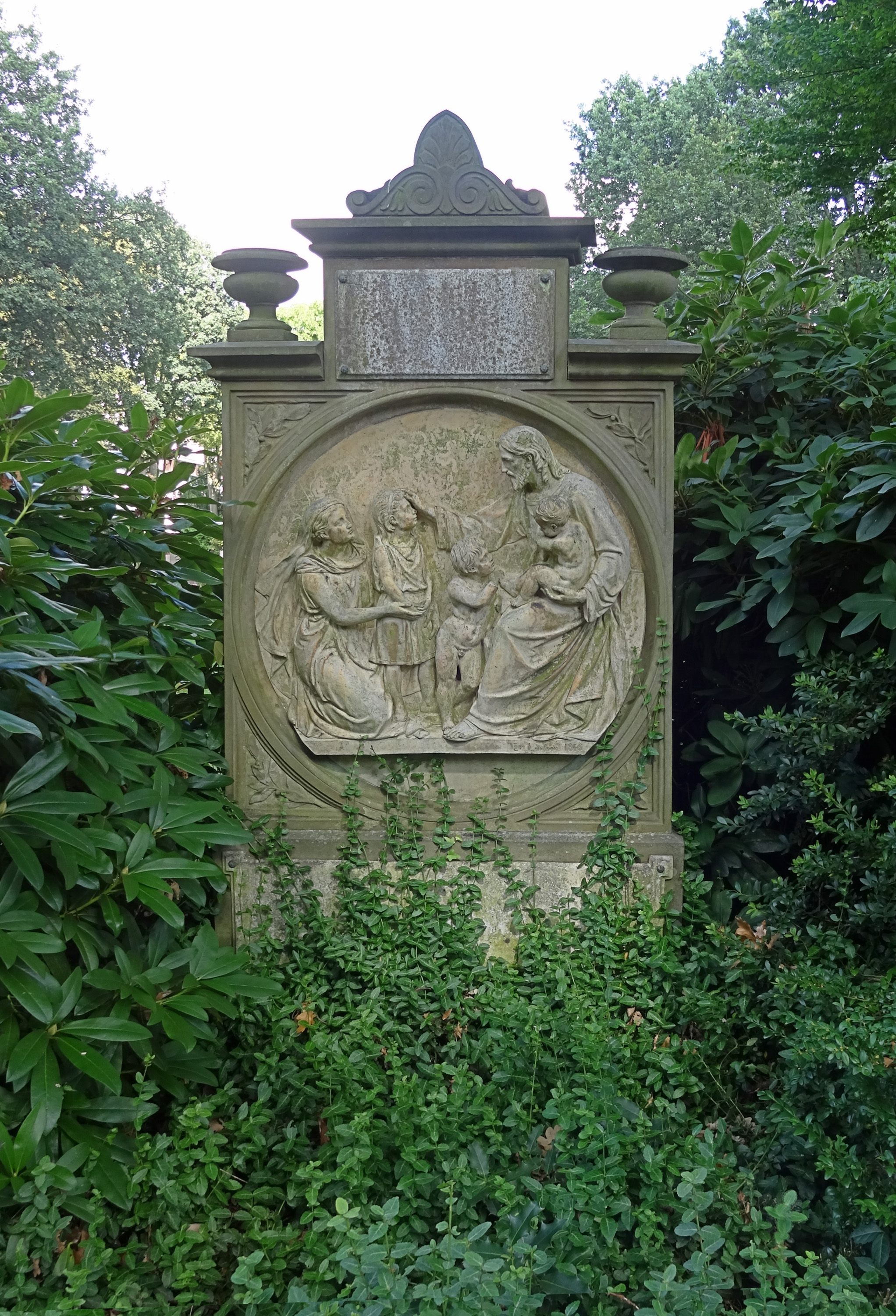 Buntentorsfriedhof in Bremen, Buntentorsteinweg 65Die Gesamtanlage ist ein geschütztes Kulturdenkmal in der Freien Hansestadt Bremen, mit der Nr. 5154 beim Landesamt für Denkmalpflege registriert.